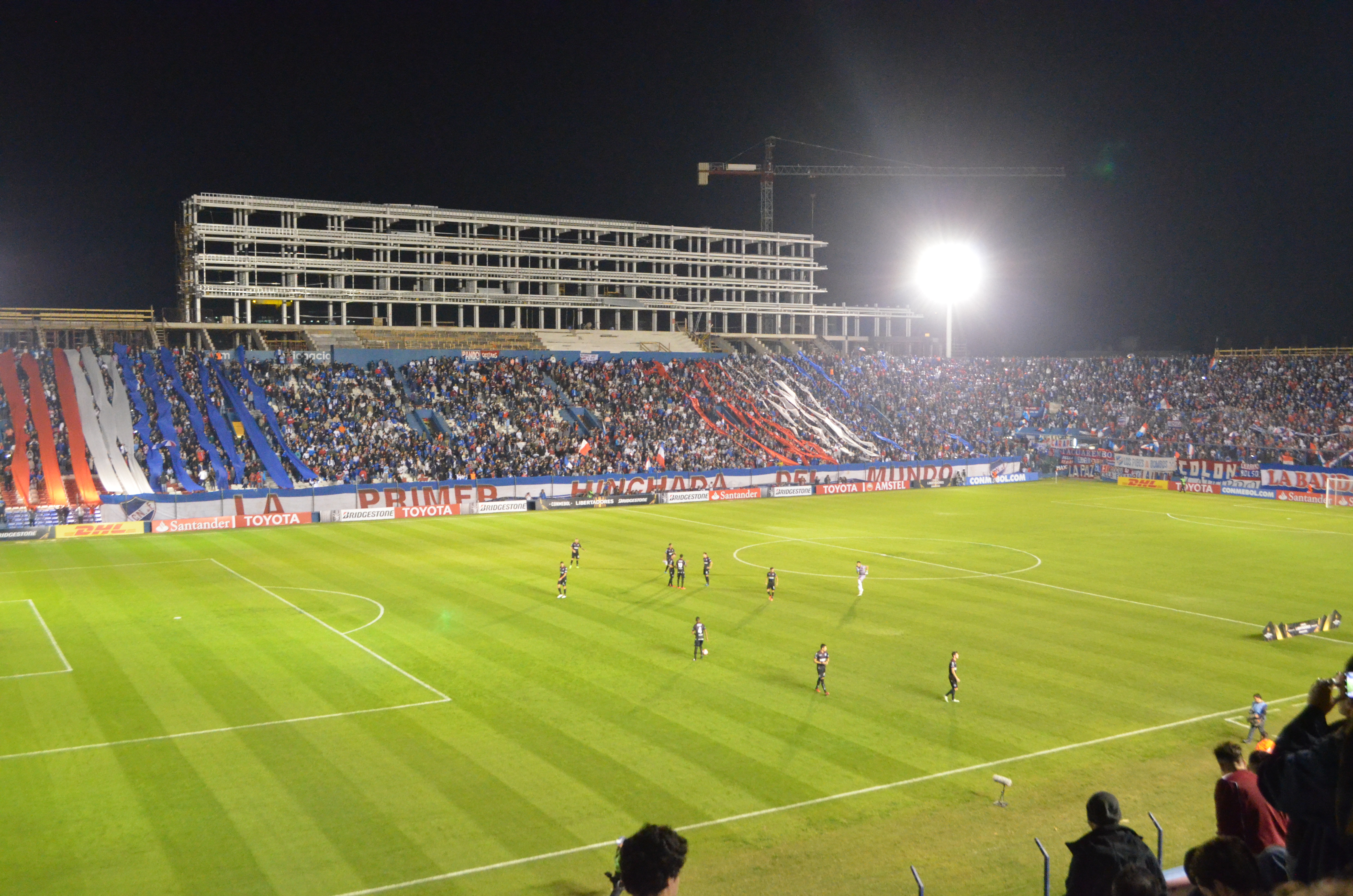 Imagen del partido disputado entre Nacional y Lanús, en el estadio Gran Parque Central, por la fase de grupos de la Copa Conmebol Libertadores 2016